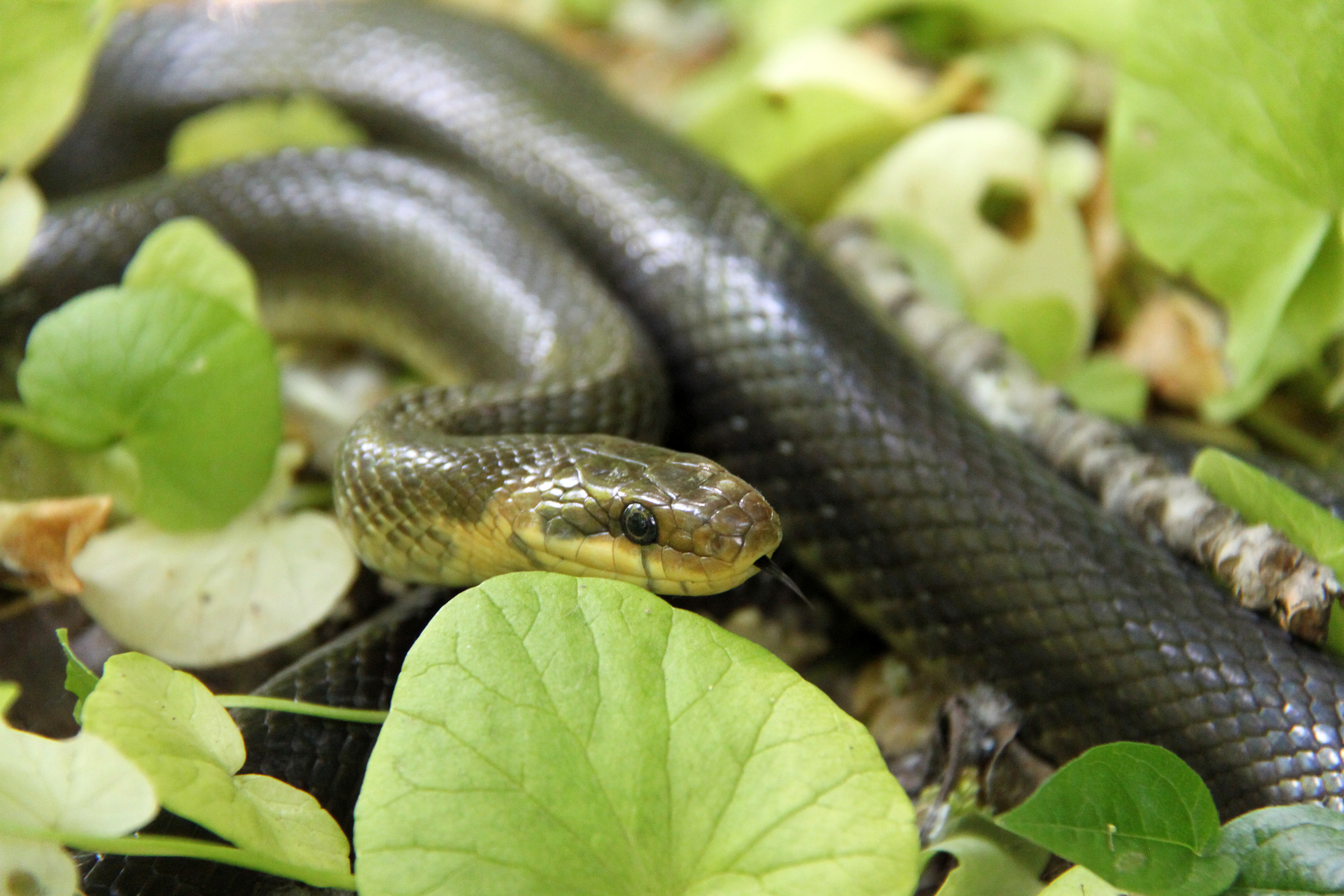 Canon EOS 500D